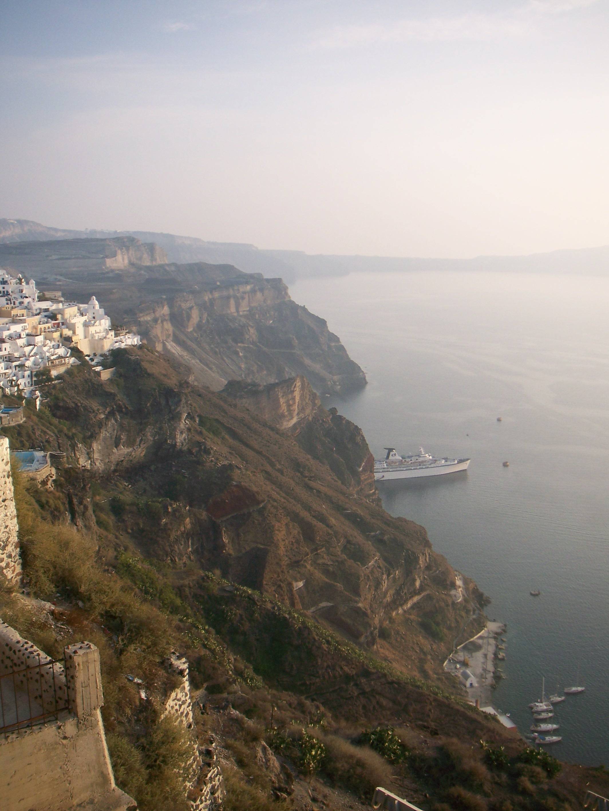 Vistas de Santorini, pequeño archipiélago circular formado por islas volcánicas, localizado en el sur del Mar Egeo, unos 200 km al sudeste del territorio continental griego. Es también conocida como Thera (o Thira, en griego Θήρα), formando el grupo de islas más meridional de las Cícladas.